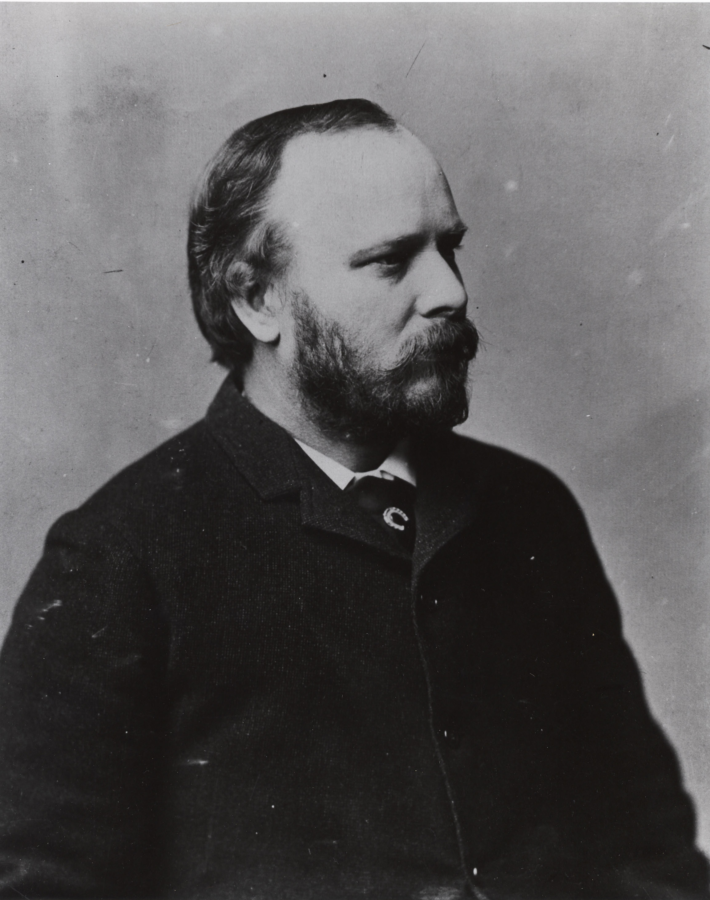 Samuel Wendell Williston ca. 1890s